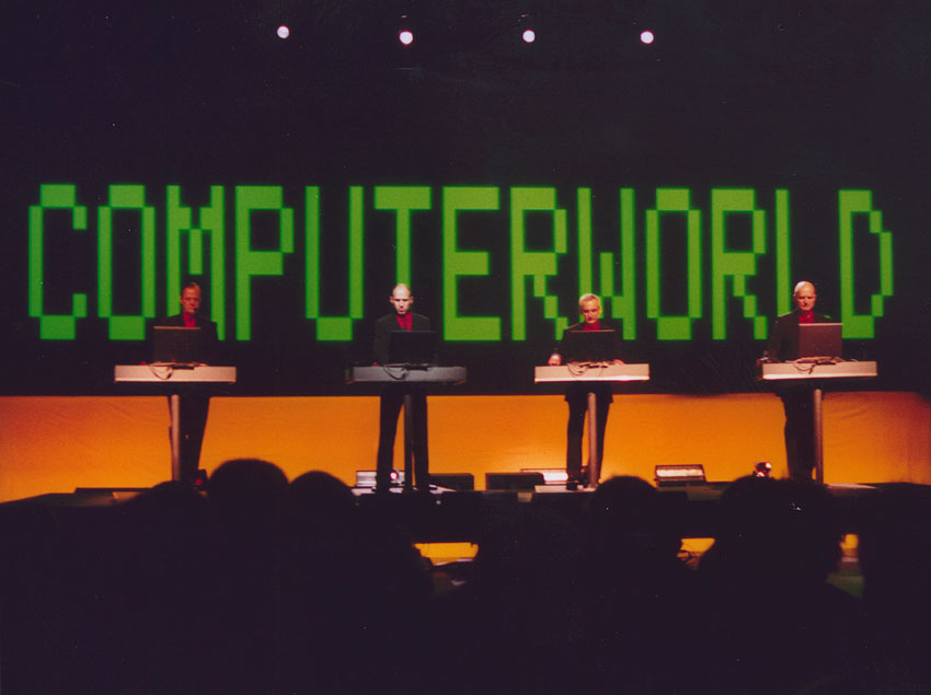 Kraftwerk framför Computerworld på Cirkus i Stockholm den 8e februari 2004. Foto: Andréas Hagström